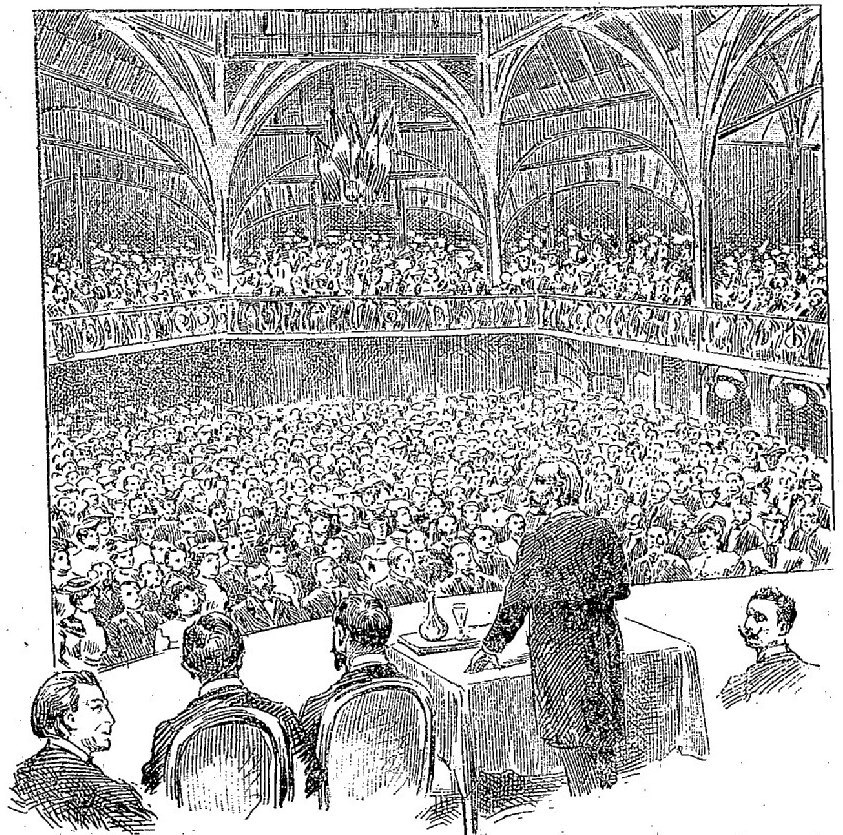 Réunion privée organisée par la Ligue patriotique des Françaises, le 21 juin 1903, salle Humbert de Romans, 60 rue Saint-Didier, à Passy.